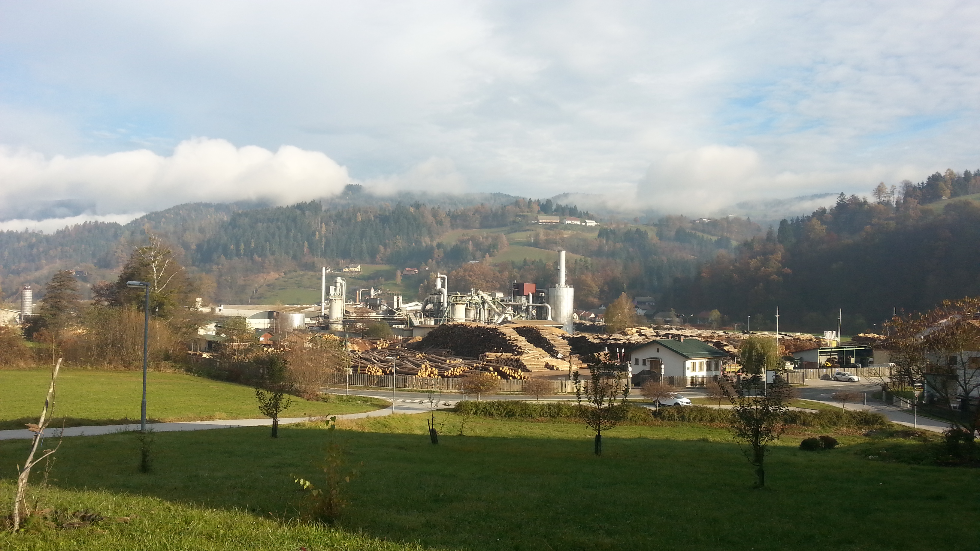 Žaga s skladiščem lesa v Otiškem Vrhu